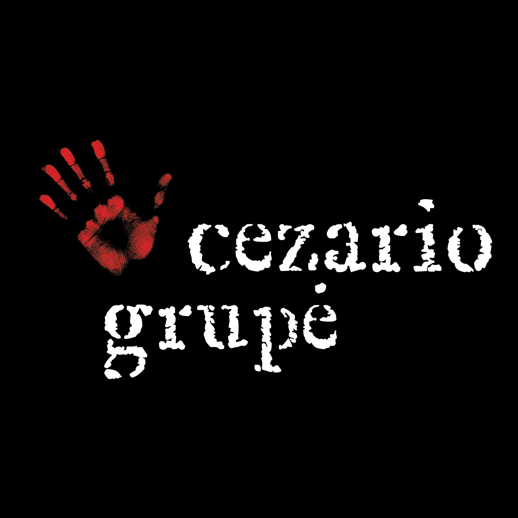 Teatro „cezario grupė“ logotipas